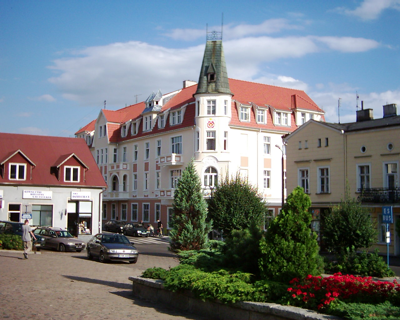 Rynek w Świeciu